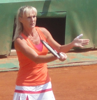 Andrea Temesvári à Roland-Garros lors du Trophée des Légendes en 2011